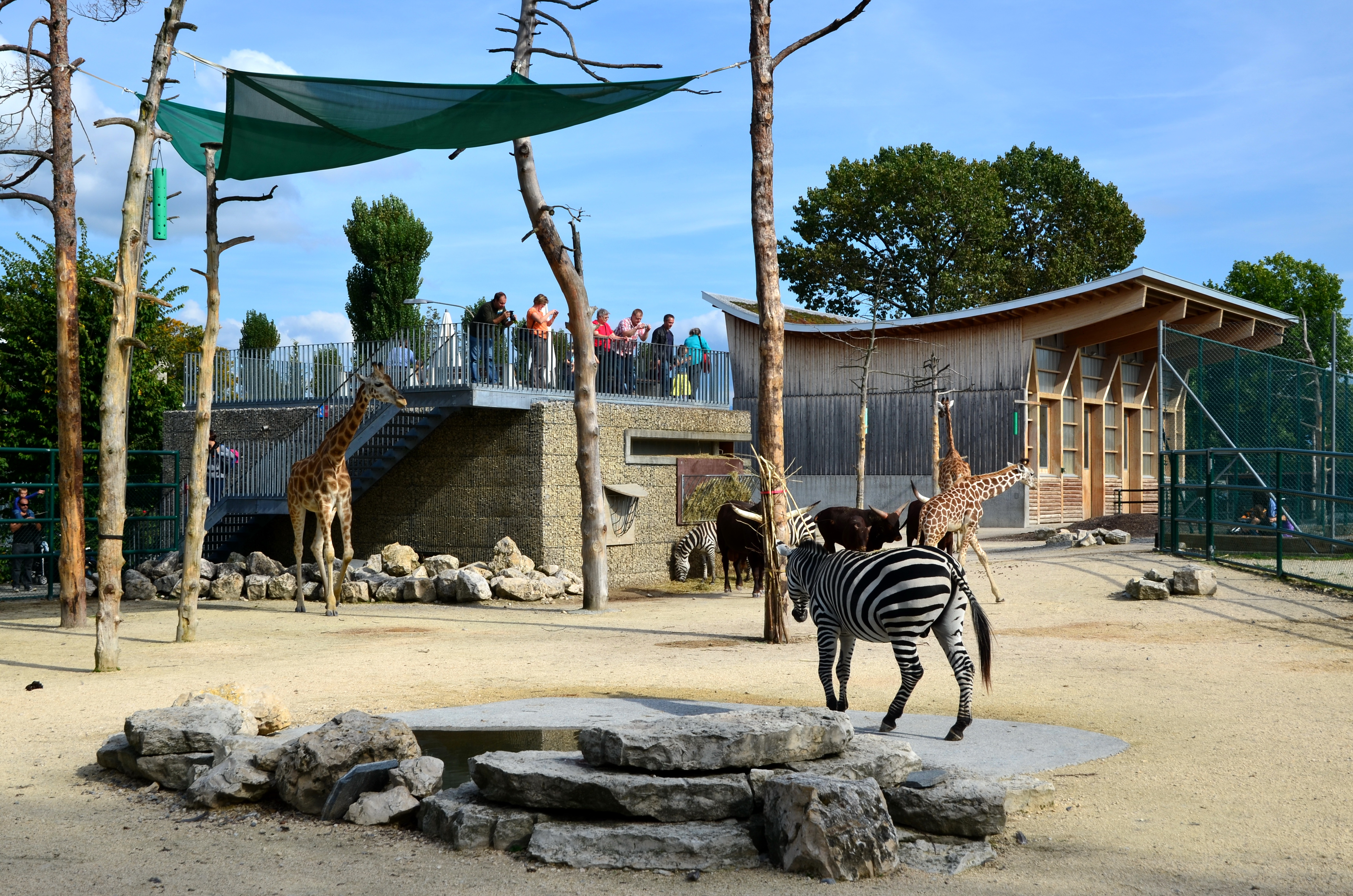 Knie's Kinderzoo in Rapperswil (Switzerland)